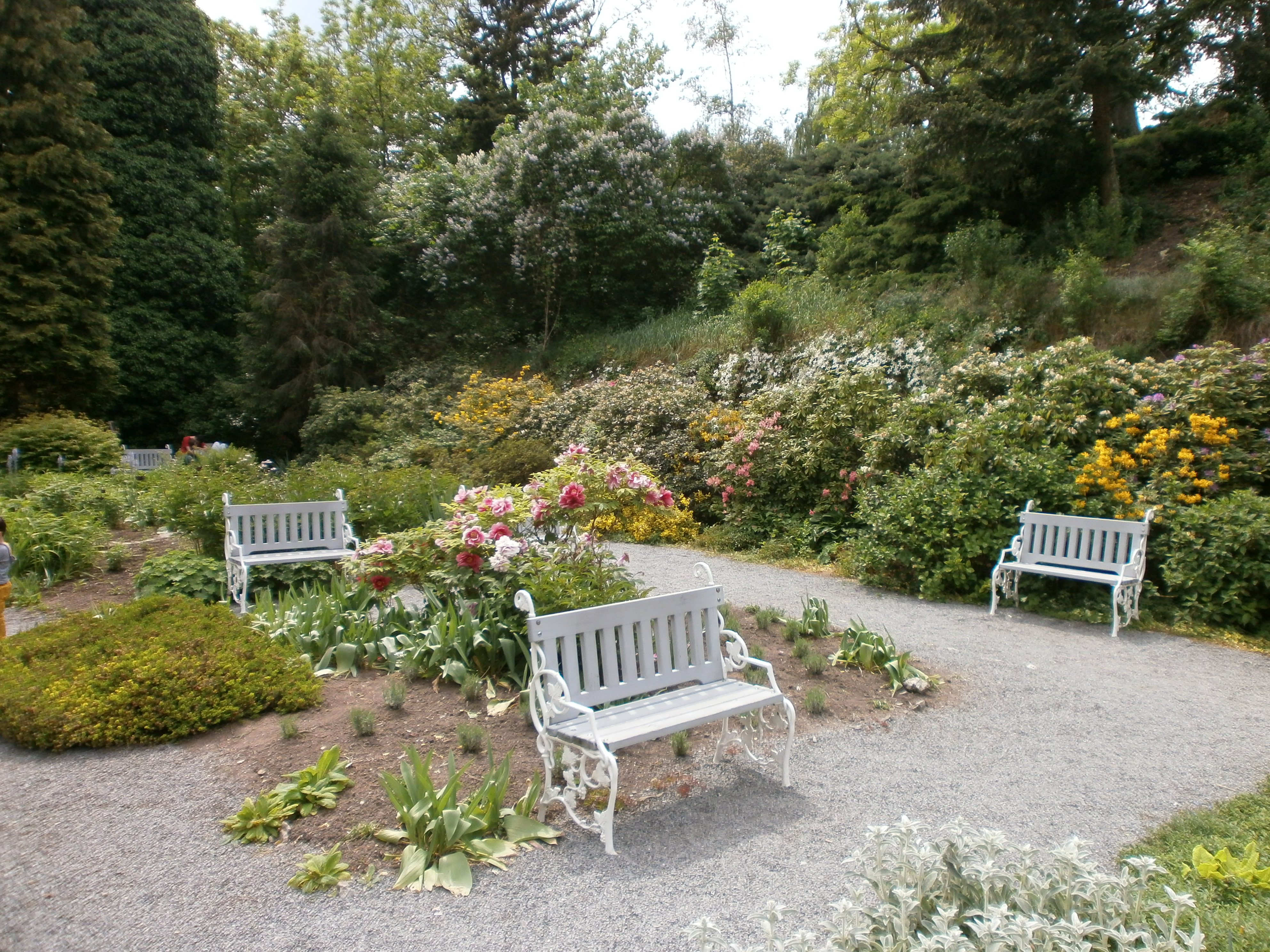 Zahrada Květnice, Petřín, Praha, polovina května